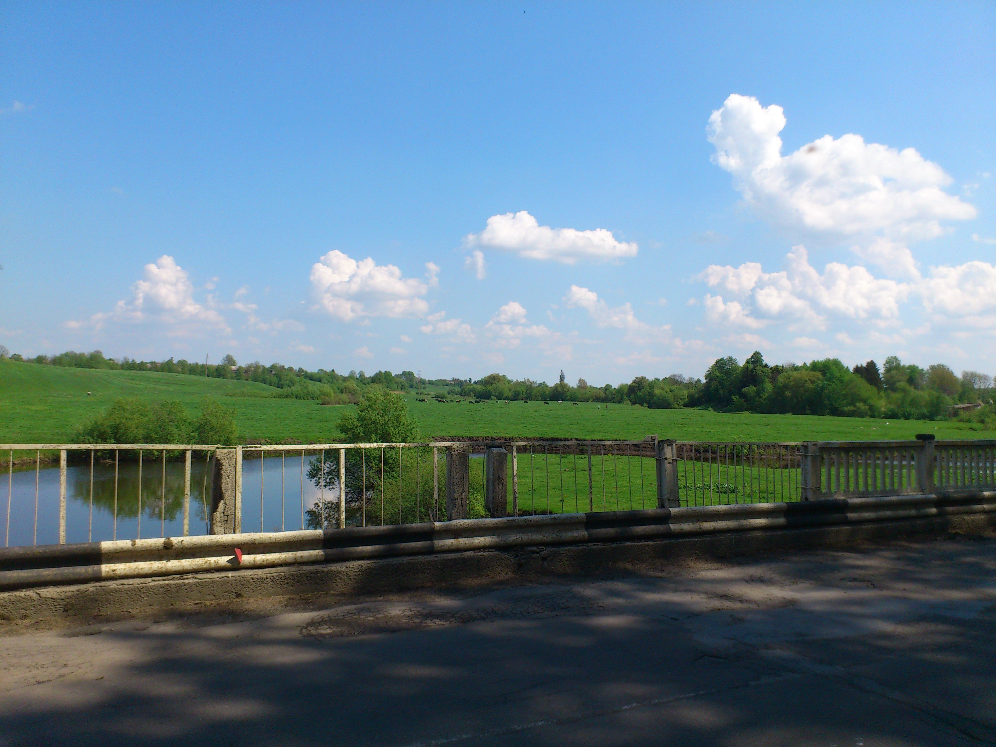 Міст через р. Хомора на трасі Тернопіль-Біла Церква. Зруйнована огорожа, асфальтне покриття в надзвичайно поганому стані.